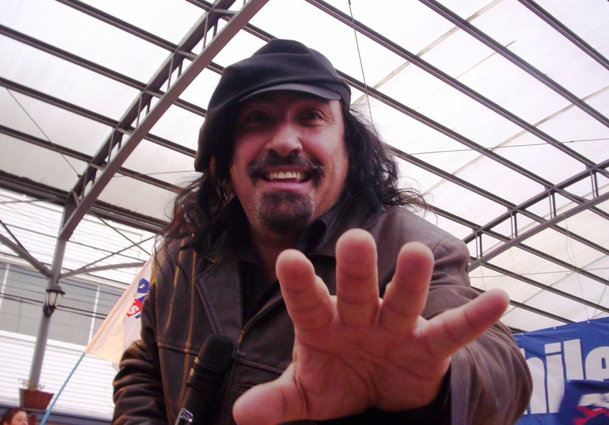 Negro Piñera participando de la campaña presidencial de Sebastián Piñera en Puerto Varas, Chile, en 2006.